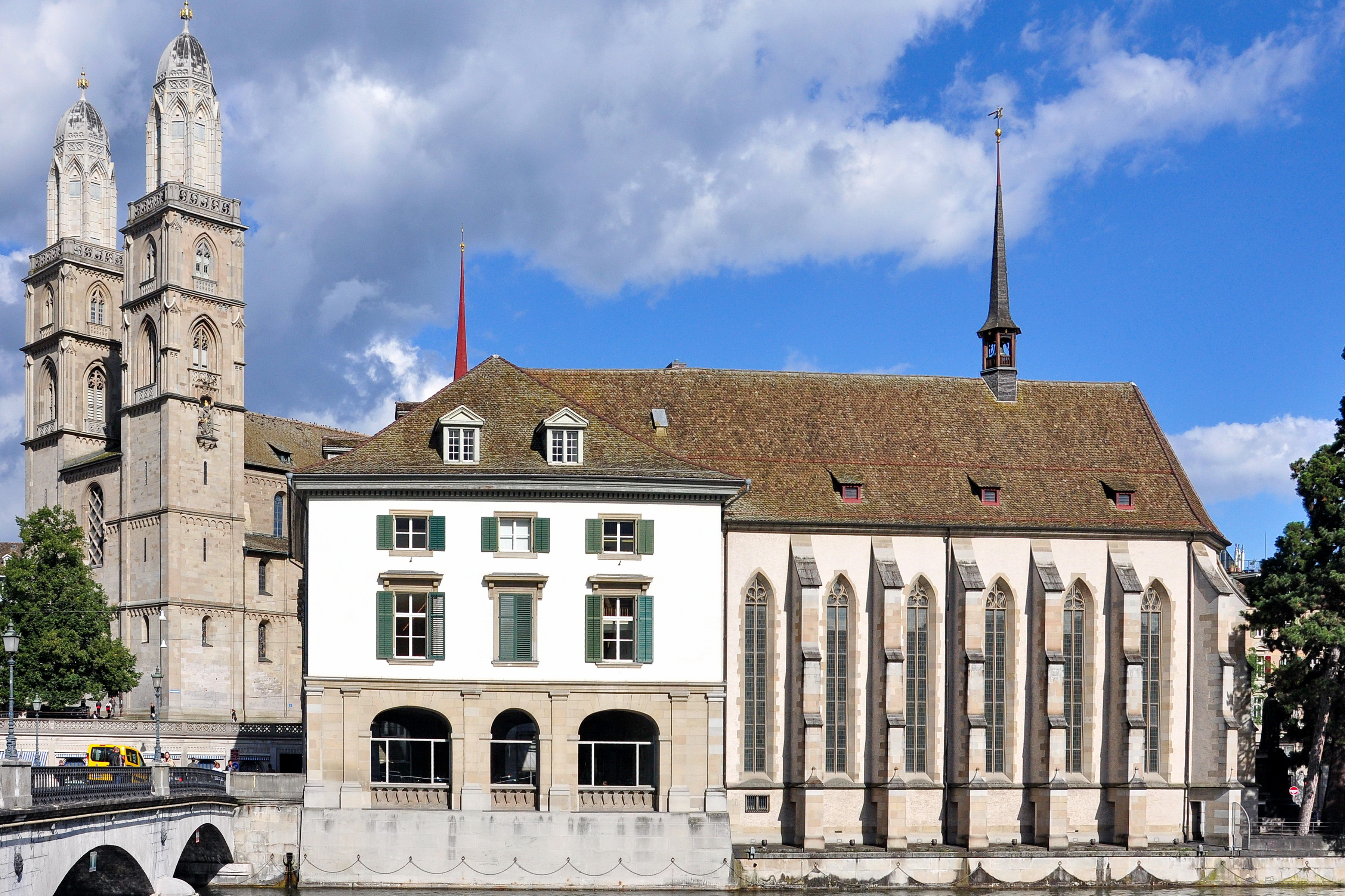 Helmhaus and Wasserkirche in Zürich (Switzerland), as seen from Stadthausquai nearby Münsterhof, Grossmünster to the left.